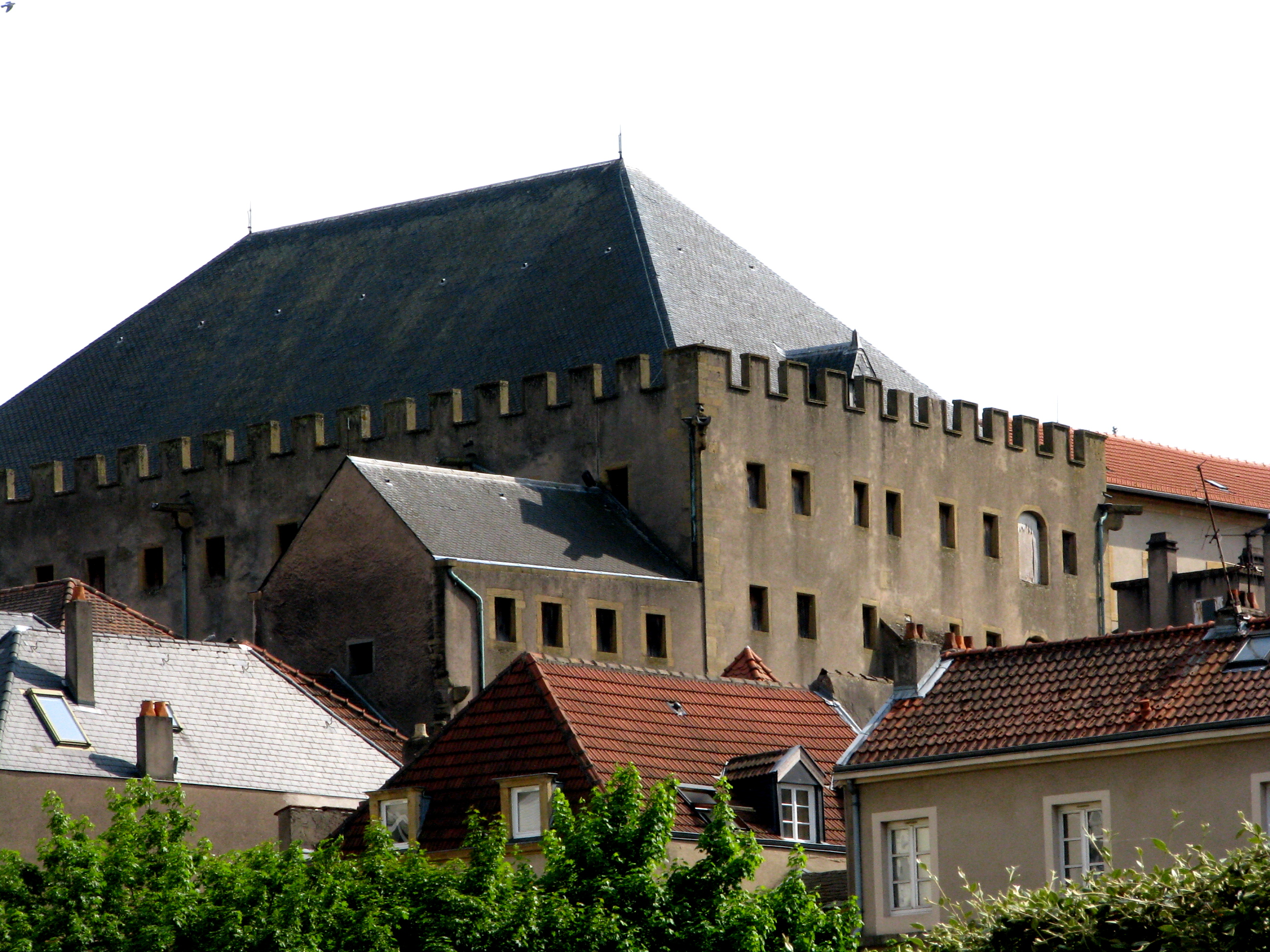 Période de construction fin 15e siècle et 2eme quart 16e siècle. Fait actuellement partie de l'ensemble du musée de La Cour d'Or .